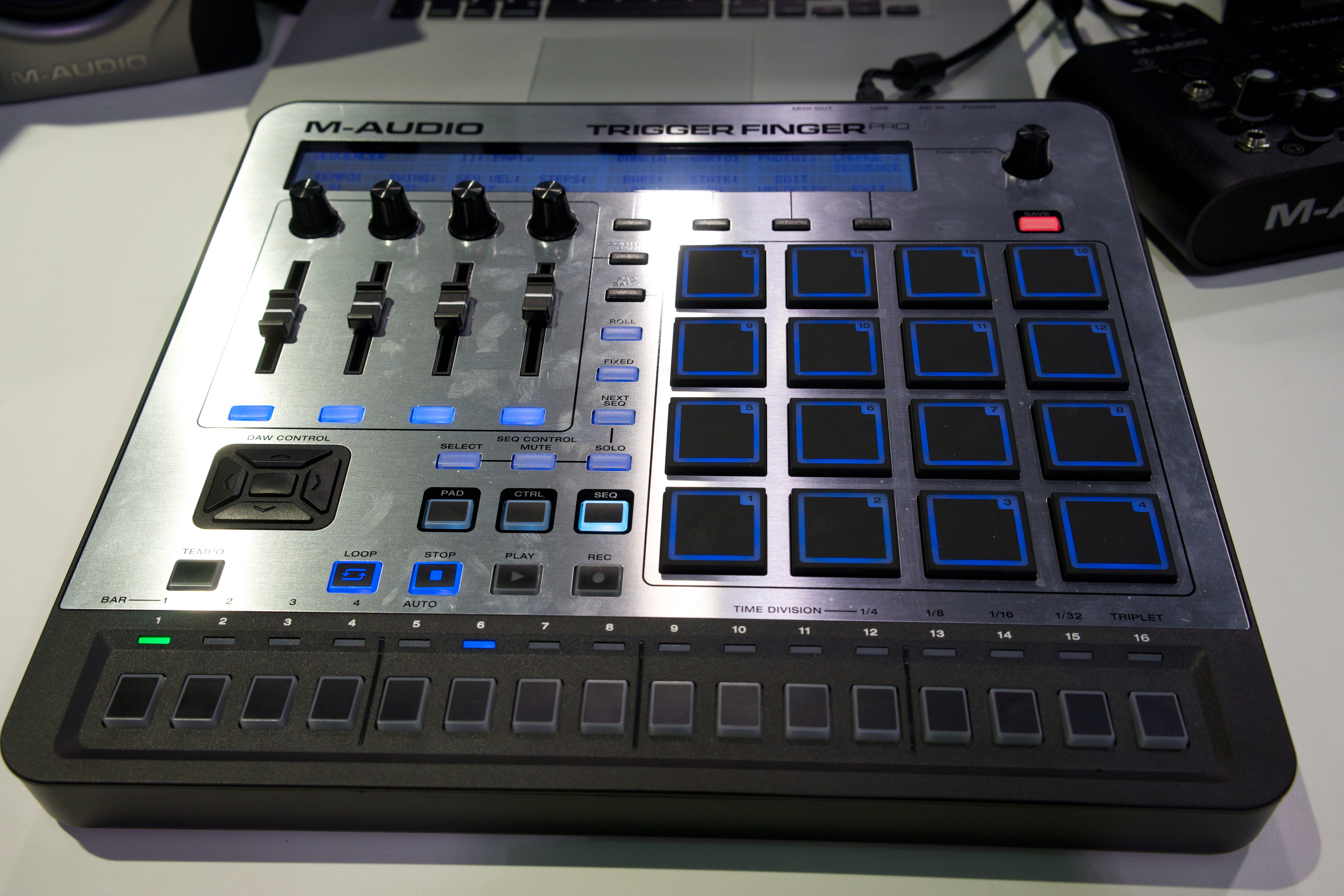 M-Audio Trigger Finger Pro